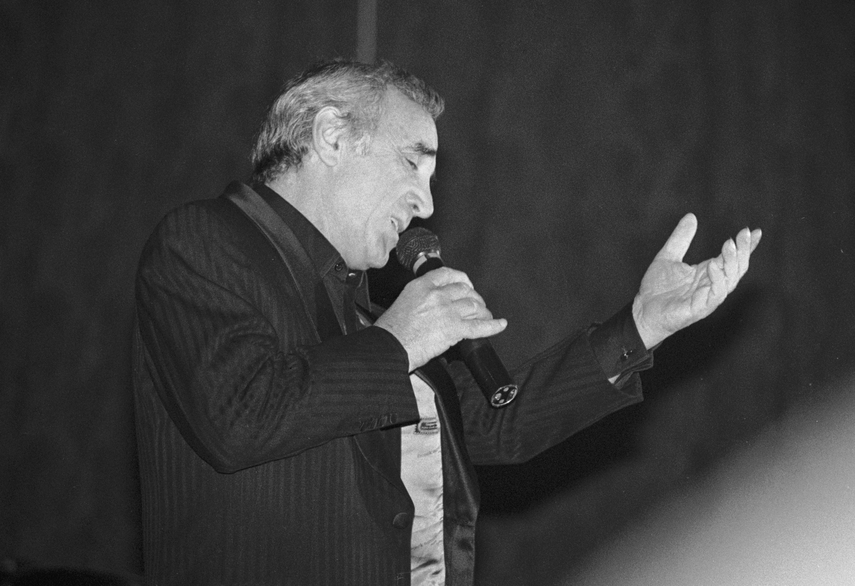 Le chanteur français Charles Aznavour en concert à Deauville (Normandie, France) en septembre 1988.